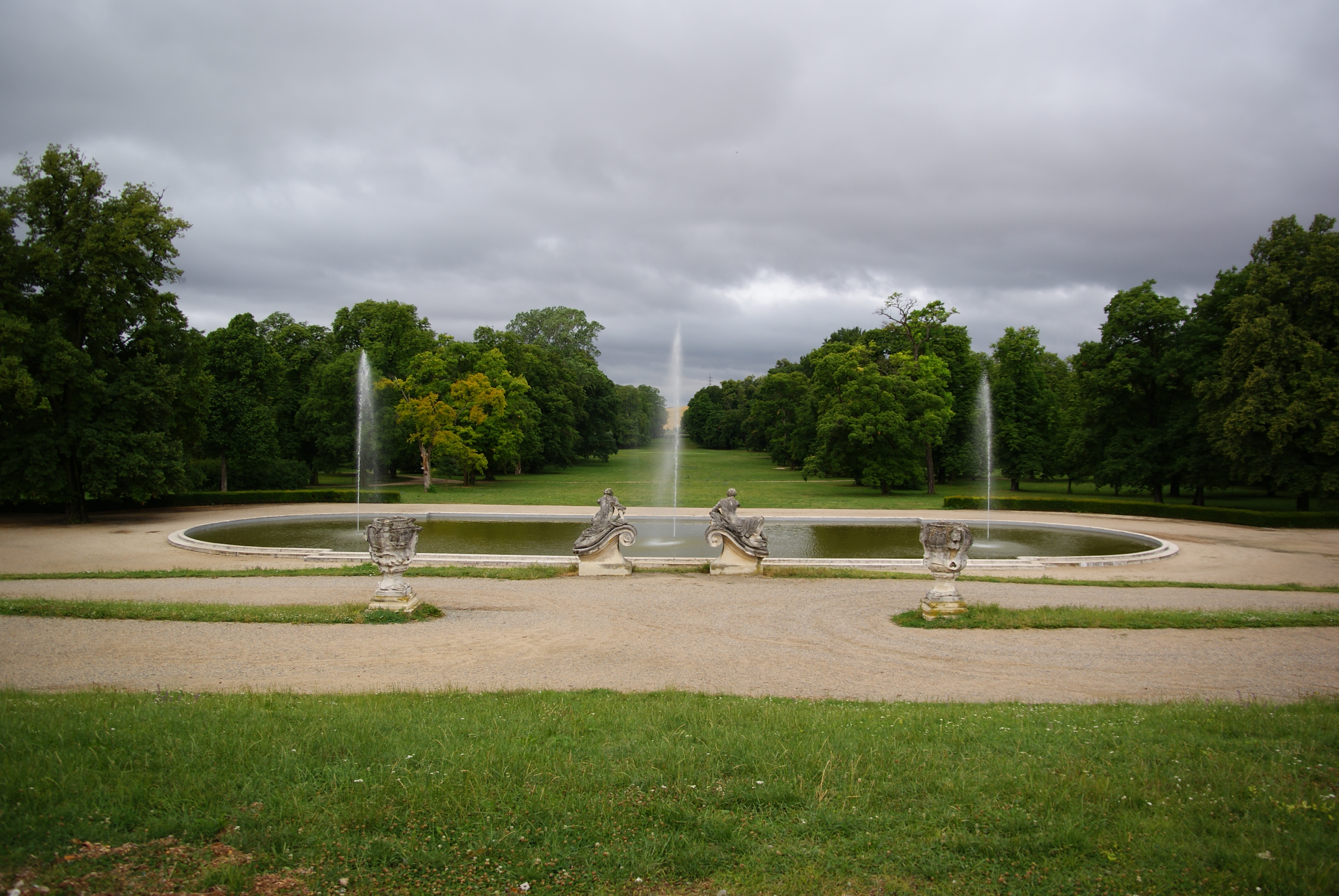 Zámek s předzámčím, parkem a sochařskou výzdobou Slavkov u Brna, Palackého náměstí 1, Slavkov u Brna